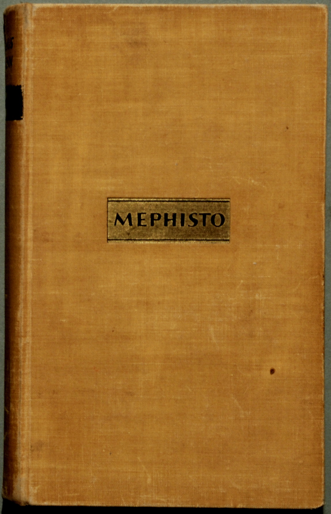 Mann, Klaus: Mephisto. Roman einer Karriere. Amsterdam: Querido 1936, 399 S. + eine Nachbemerkung. Erstausgabe (Wilpert/Gühring² 18). Gelbes Orig.-Leinen 8°.